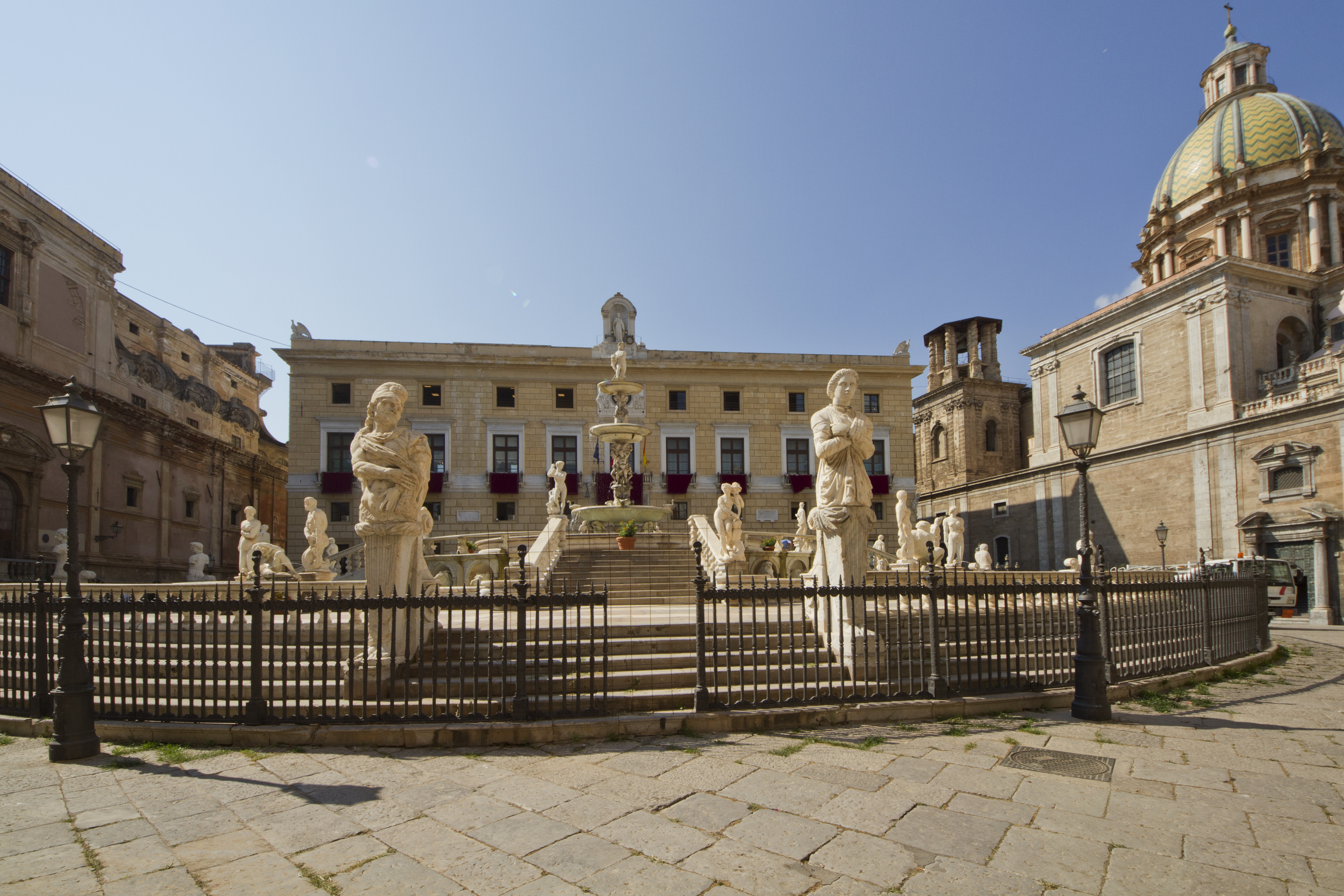 Fontana Pretorià, Kalsa, Palermo, Sicily, Italy